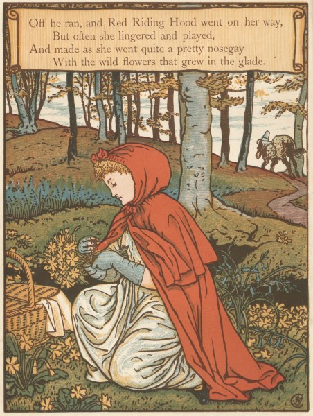 Гравюры по рисункам Крейна к сказкам «Синяя Борода», «Спящая Красавица», «Красная Шапочка», «Джек и бобовый стебель»